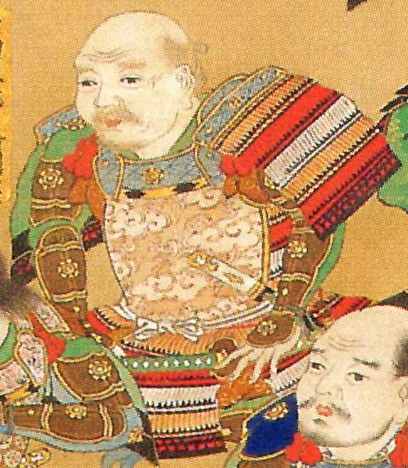 戸田忠次の肖像。